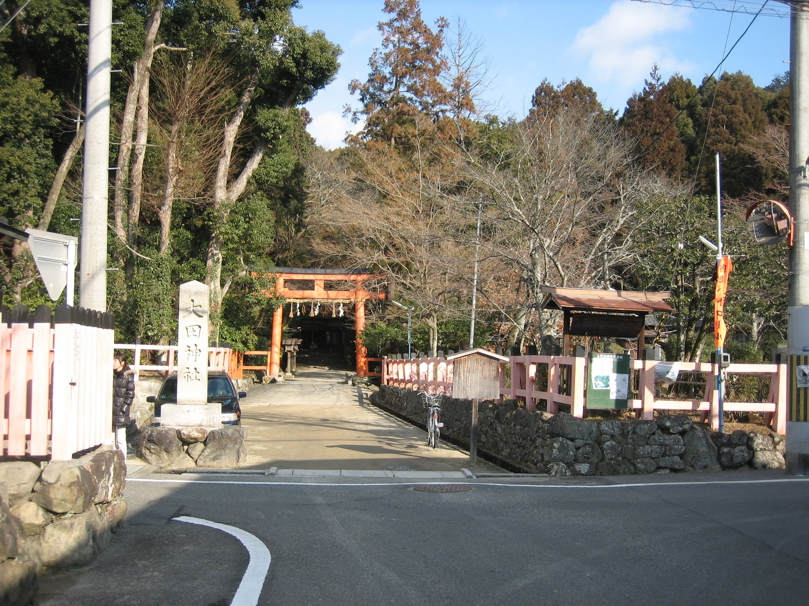 大田神社鳥居を京都市北区上賀茂岡本町から撮影